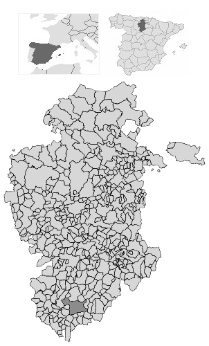 Ubicación de Aranda de Duero en la provincia de Burgos